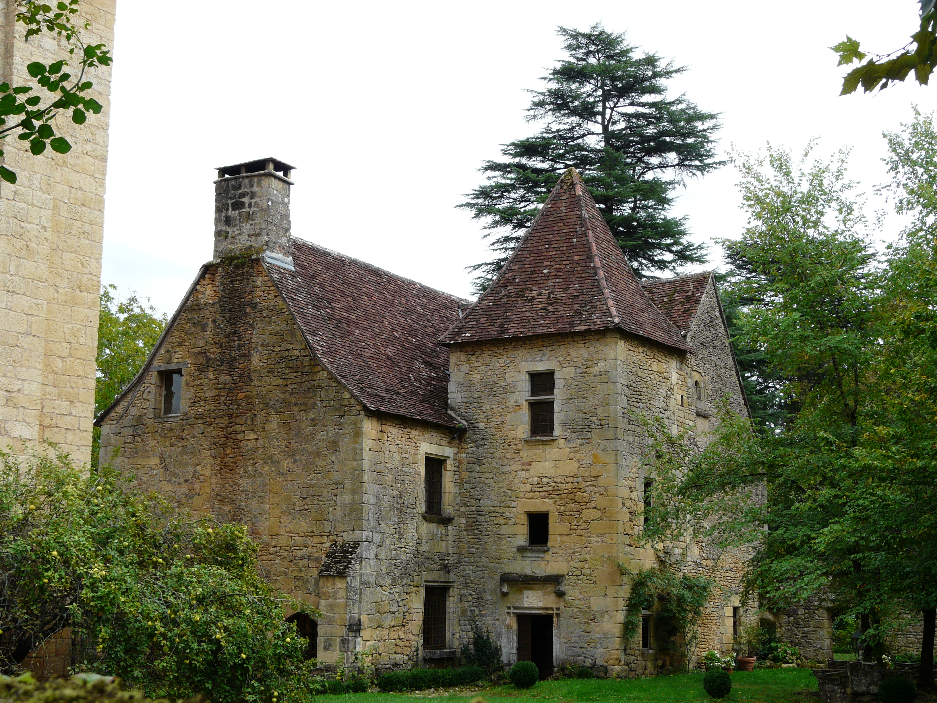 L'ancien prieuré du manoir de la Salle, Saint-Léon-sur-Vézère, Dordogne, France. This building is en partie classé, en partie inscrit au titre des Monuments Historiques. .